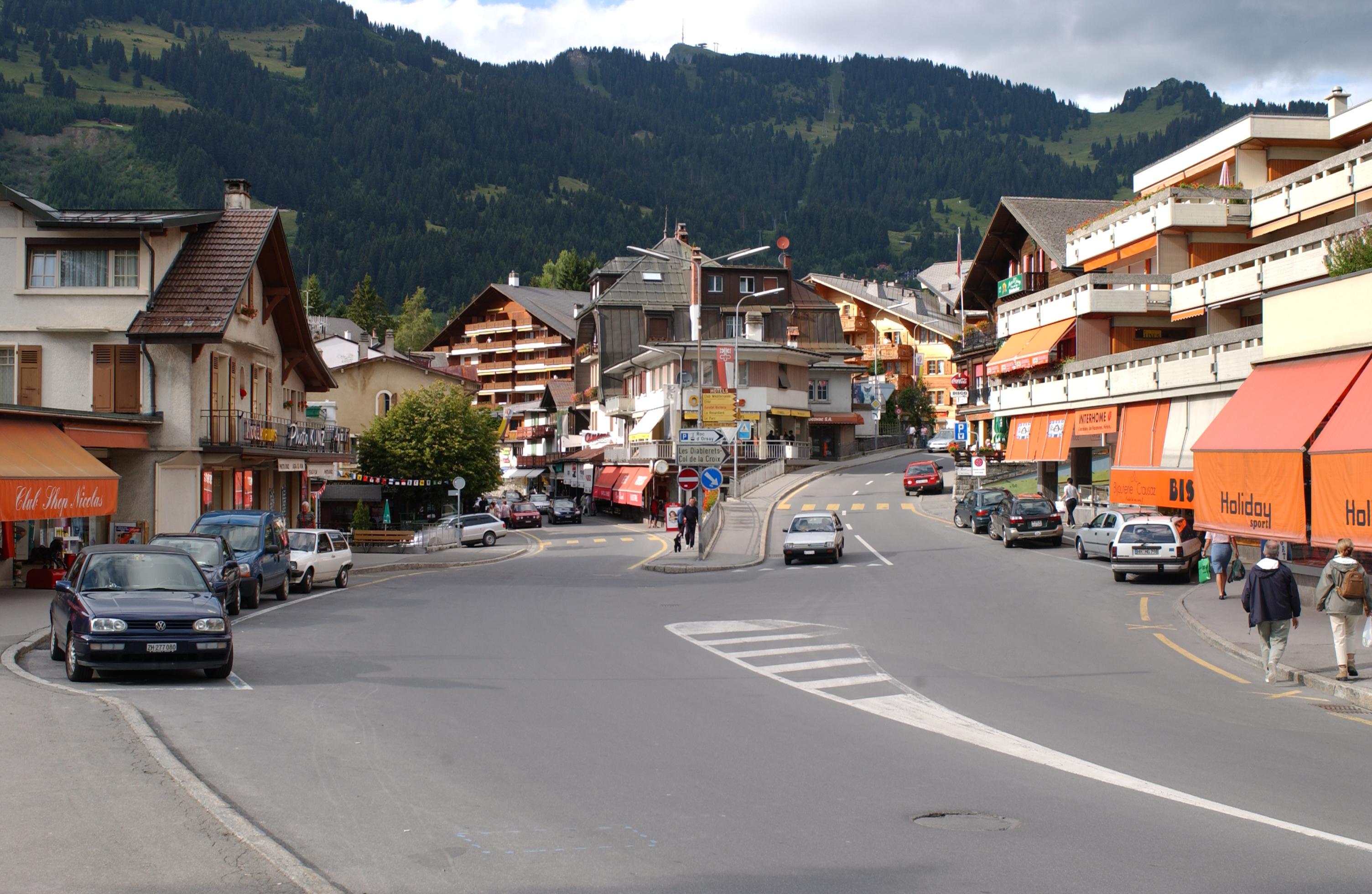 Villars-sur-Ollon, le centre.